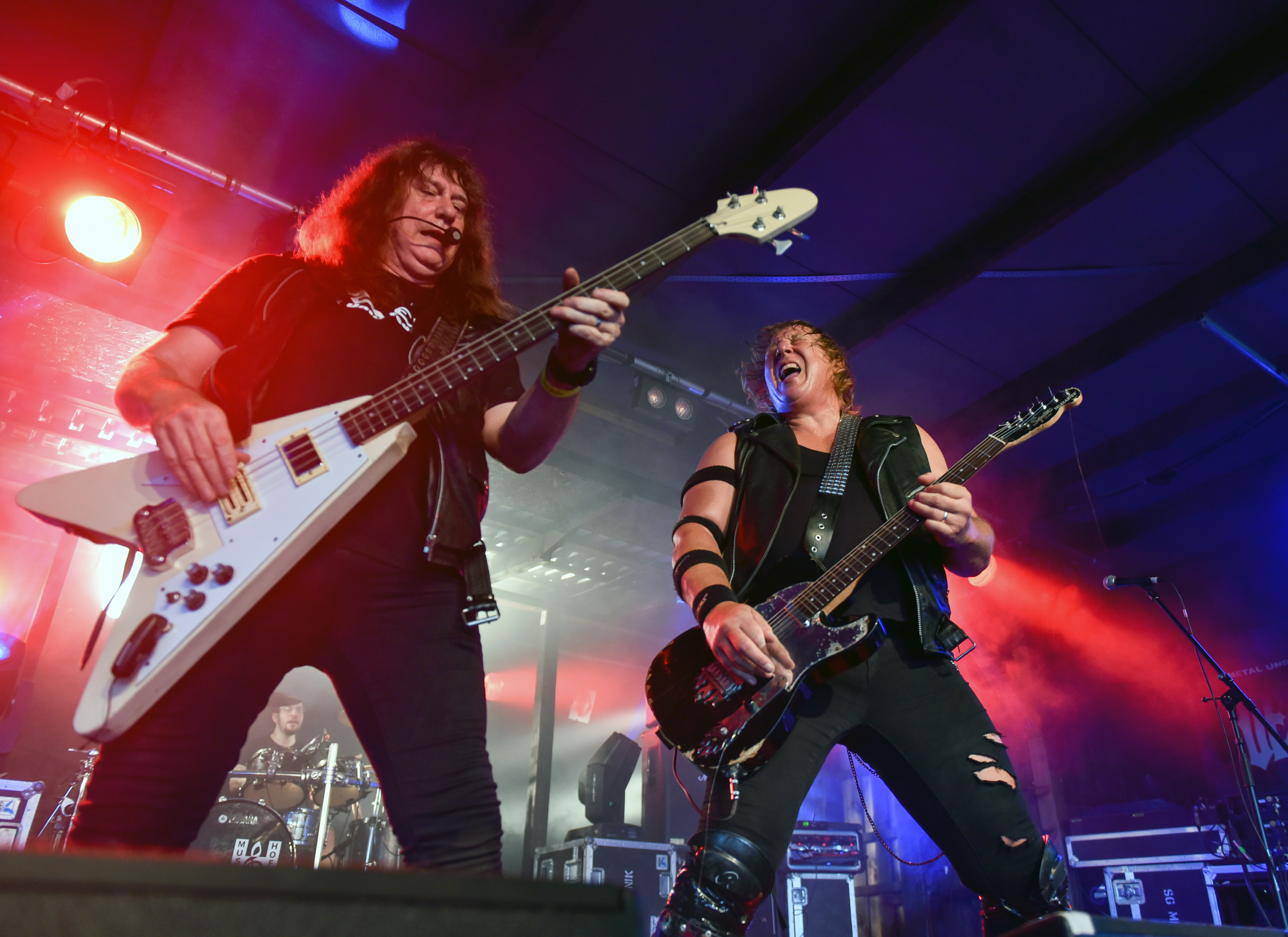 Raven beim Headbangers Open Air 2017